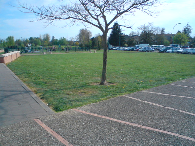 Promenade long de la Garonne ville du Passage d'Agen